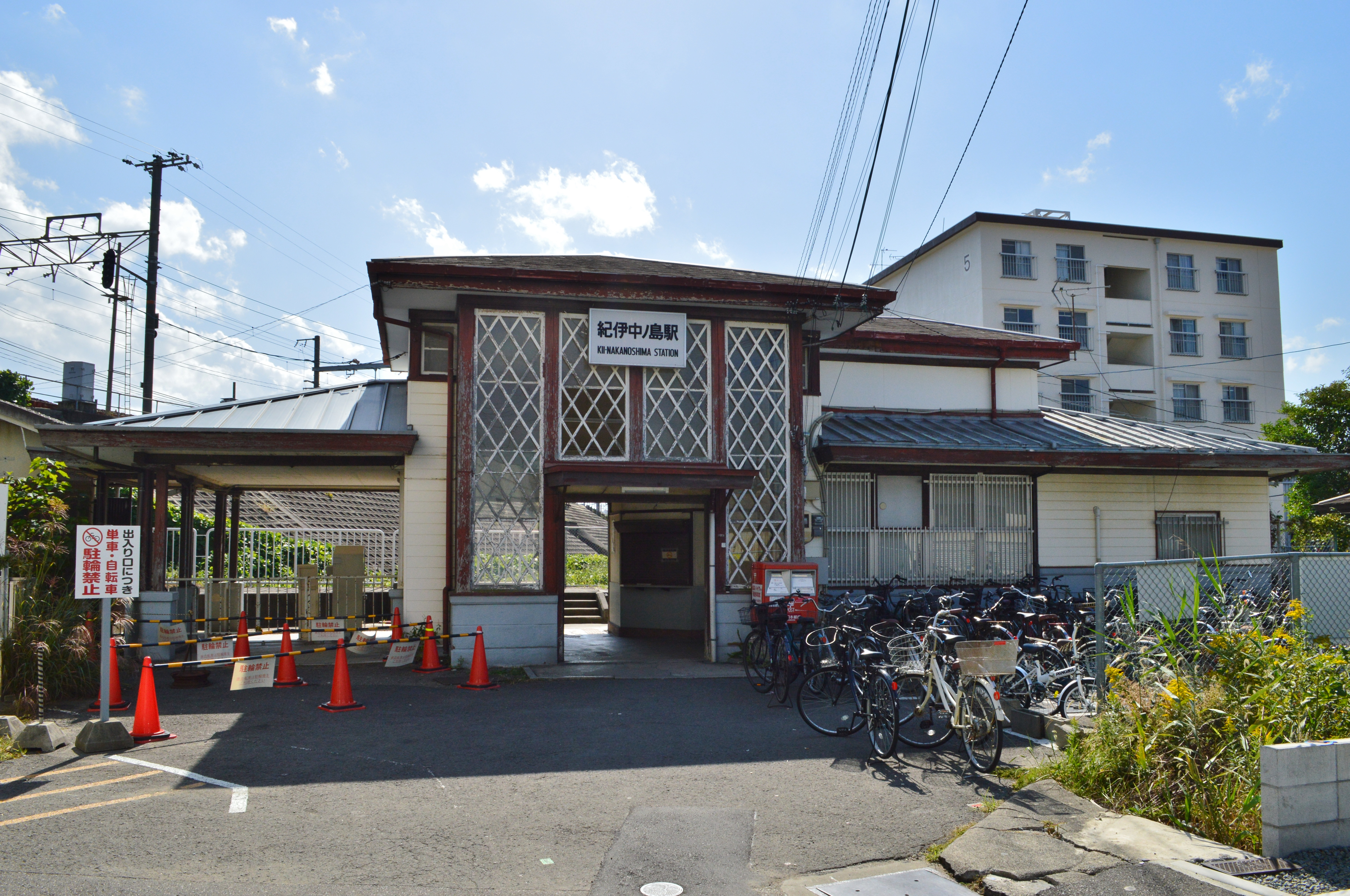 紀伊中ノ島駅 駅舎